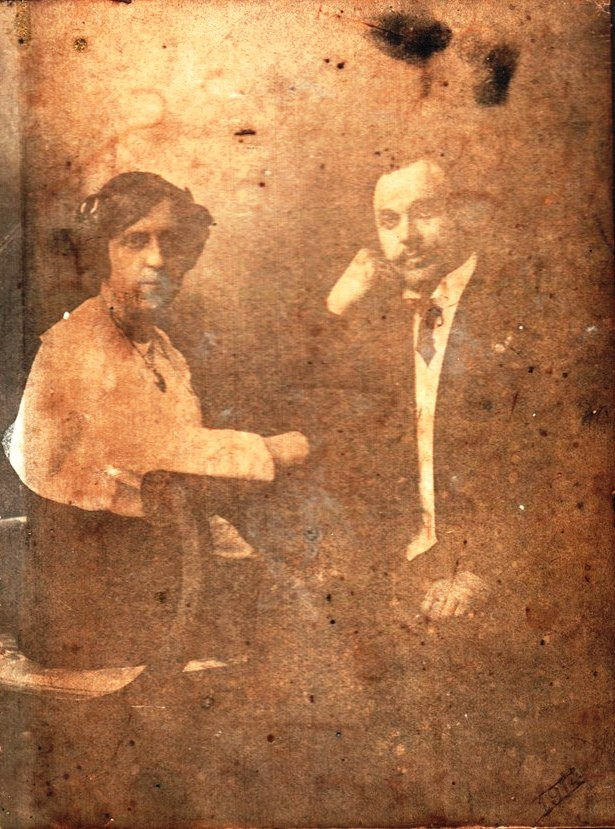 Легейда Євдокія Родіонівна